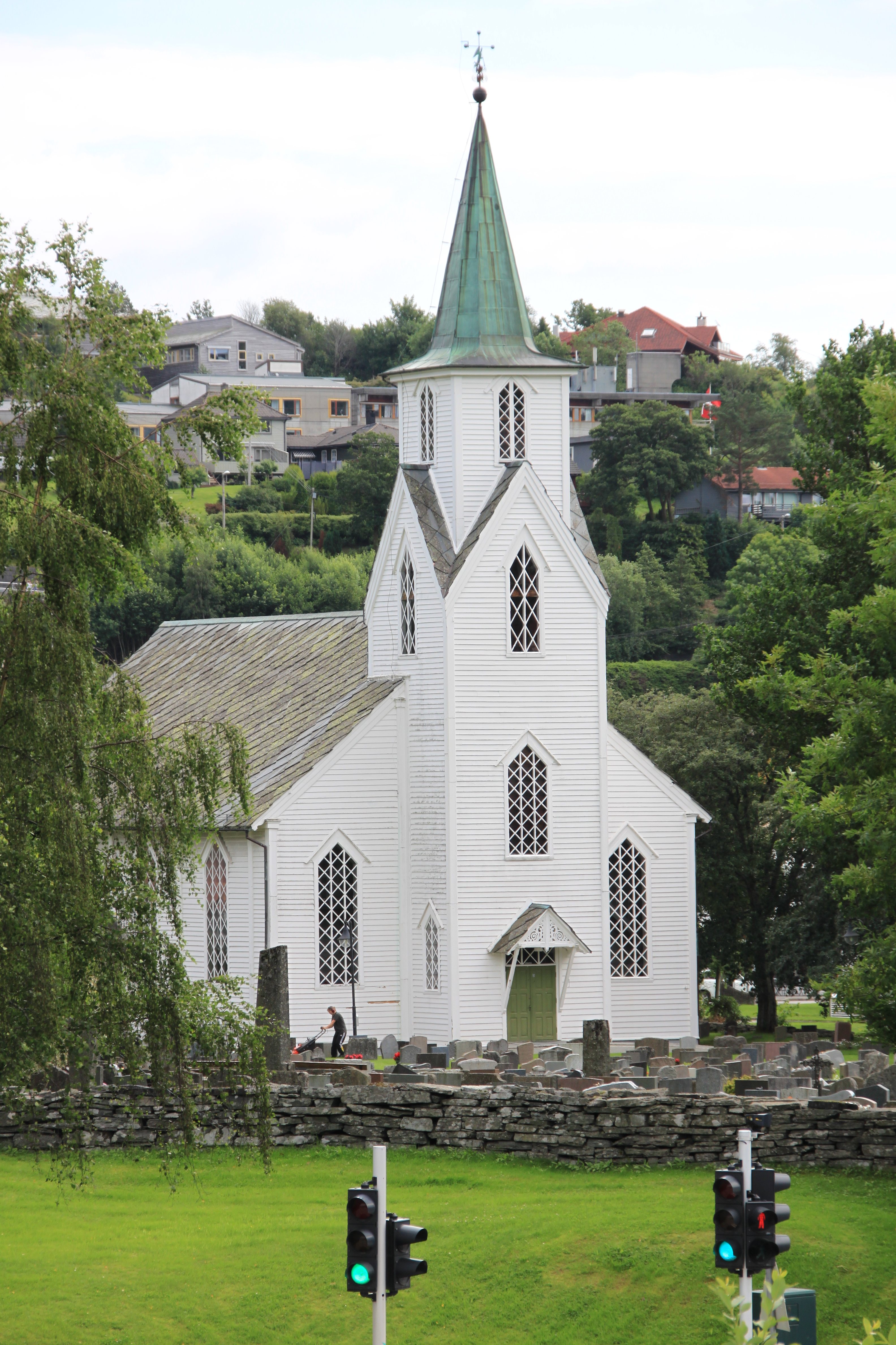 Os kyrkje fotografert fra parkeringsplassen ved biblioteket.